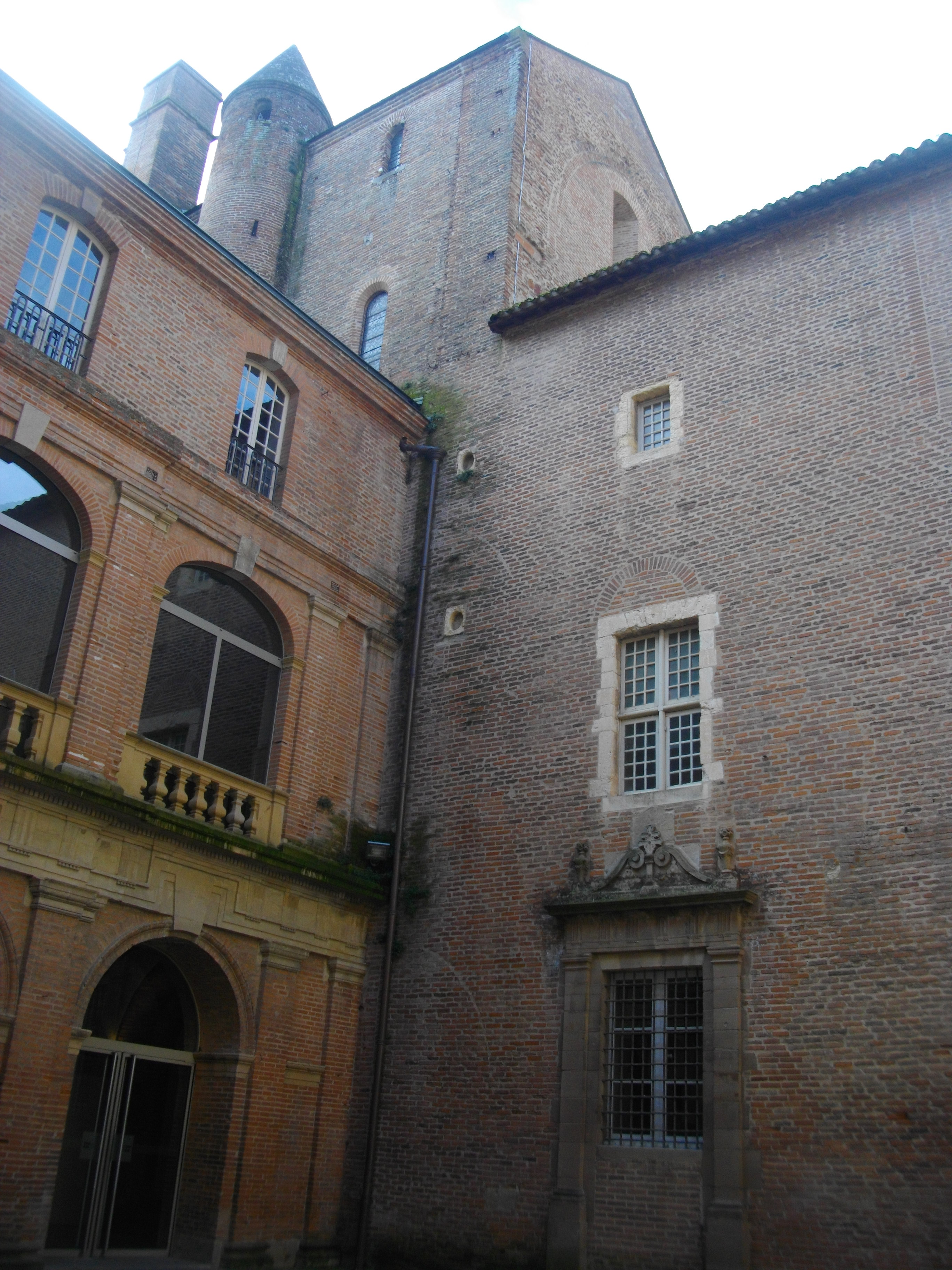 L'aula est la première batisse construite au milieu du XIIIème siècle. C'est la partie rectangulaire qui dépasse de l'angle fait par une courtine et une galerie ultérieure. Des traces sur le mur ouest montre que la courtine a été rabaissée. La tourelle ronde accolée abrite un escalier à colimaçon.